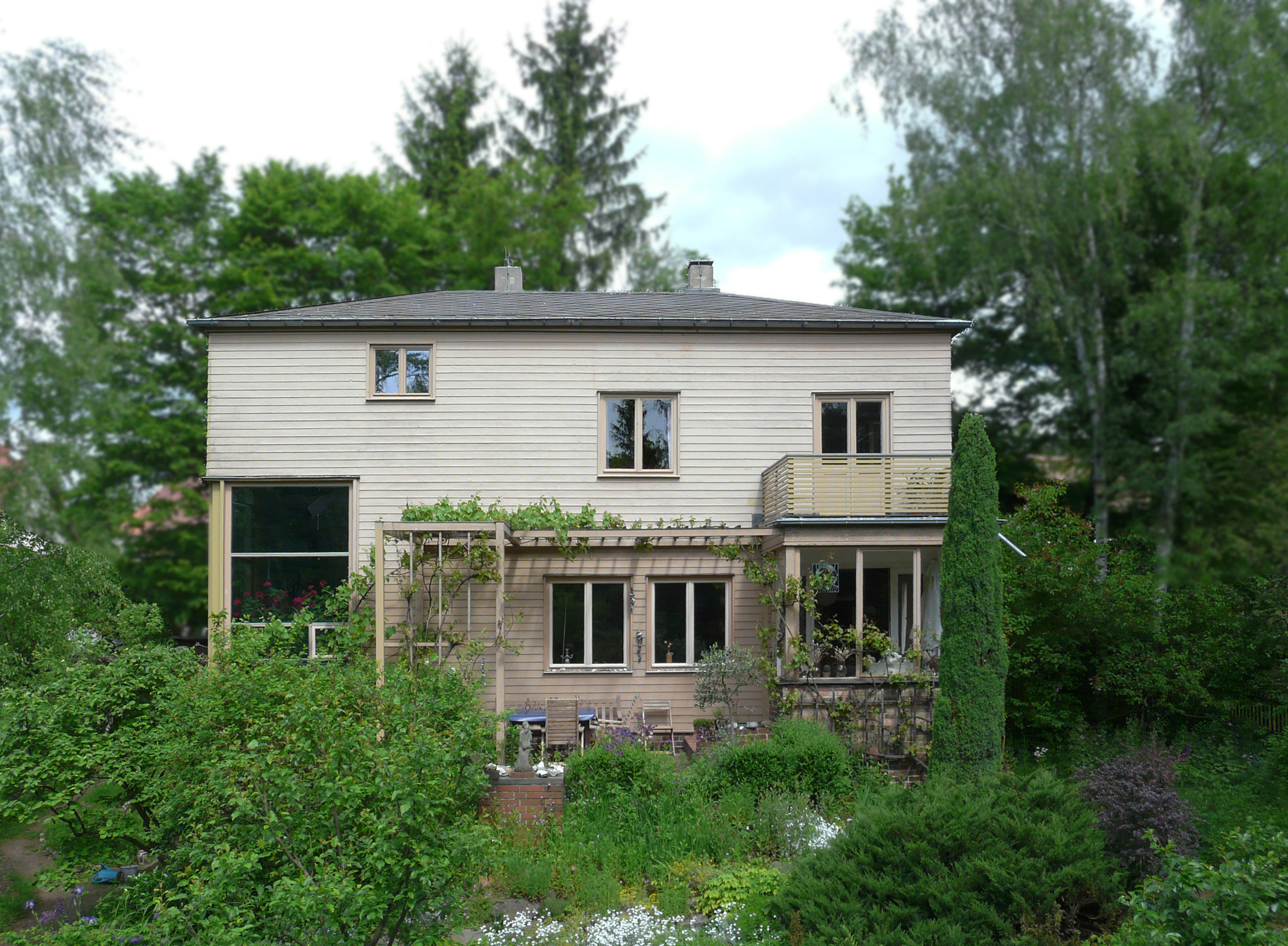 Deitsch: Fritz Steudtner, Haus Grüne Telle 6, Dresden-Hellerau, 1931, Zustand 2014